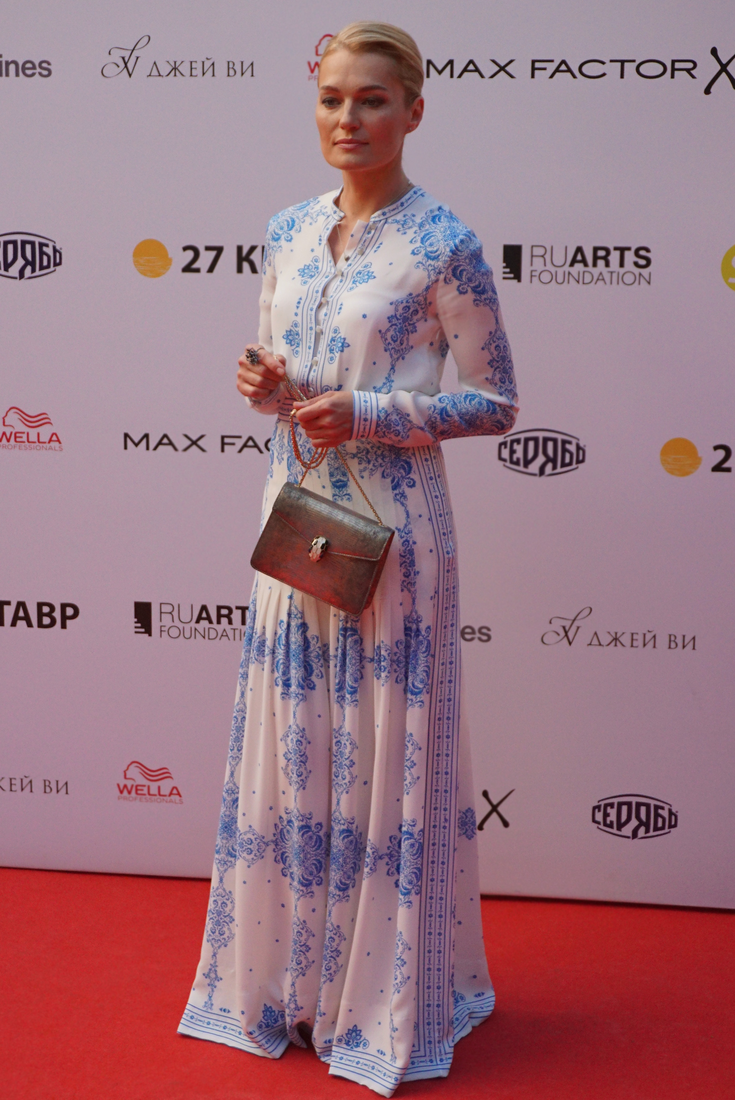 Викто́рия Ви́кторовна Толстога́нова (род. 24 марта 1972, Москва, РСФСР, СССР) — российская актриса театра и кино. Лауреат премии Правительства Российской Федерации 2005 года в области культуры. Кинотавр-2016, Сочи.